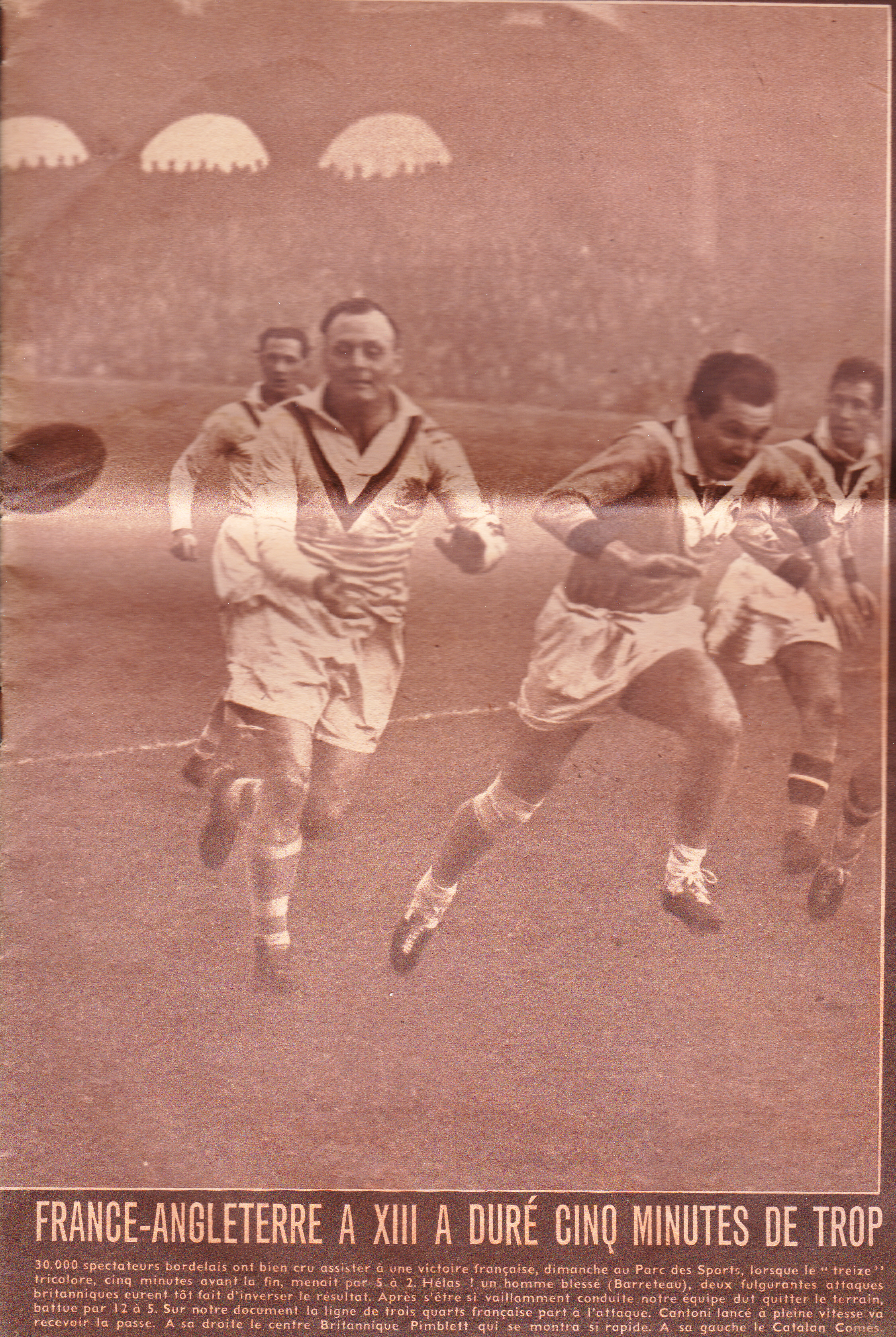 Couverture du Magazine national sportif "Miroir Sprint" n°130 29 Novembre 1948